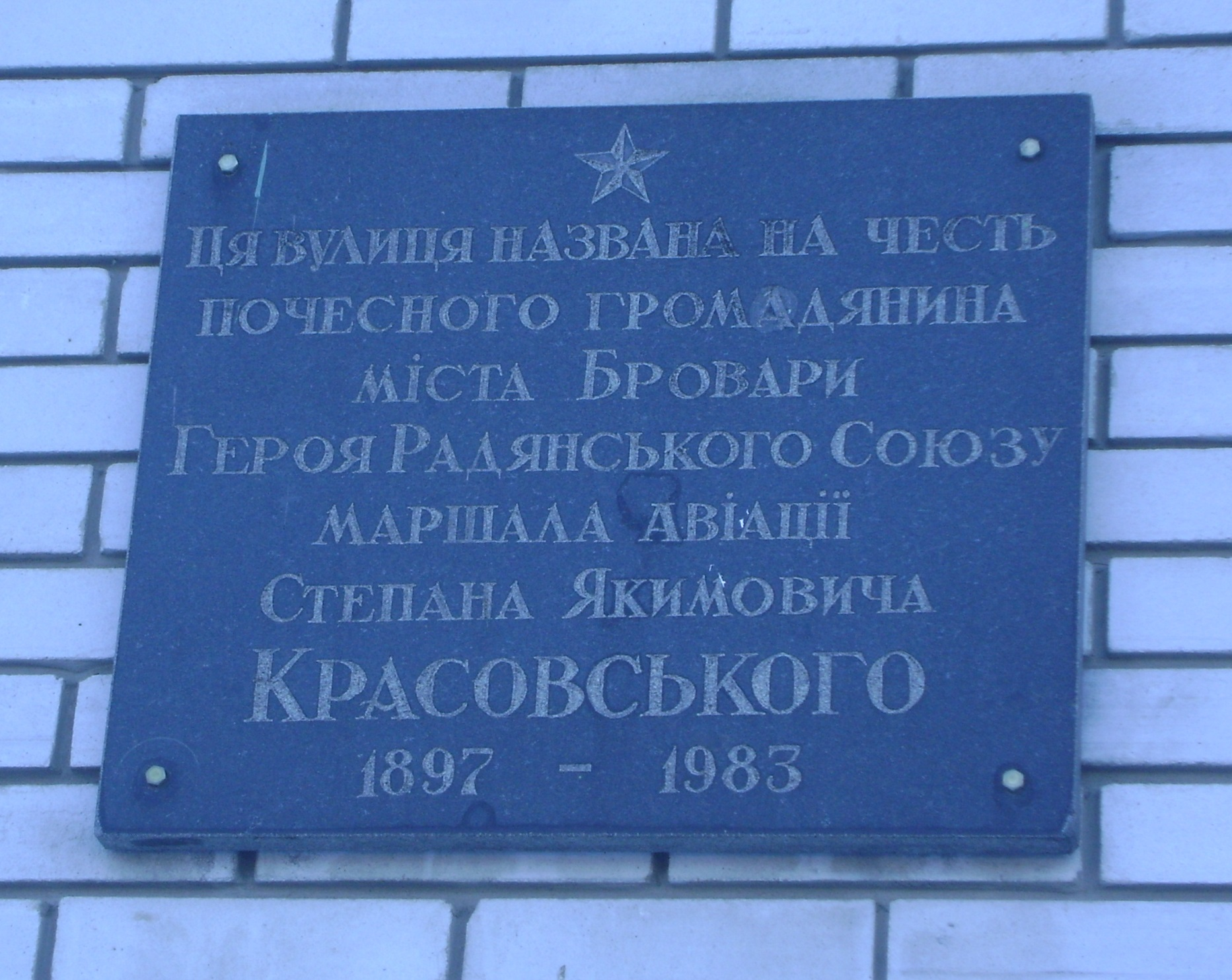 Меморіальна табличка Степану Красовському, Герою СРСР. Встановлена на початку вулиці Сергія Москаленка у Броварах, Київська область, Україна.